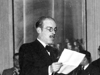 Vilar Ponte, acto de homenaxe a Pondal no centenario 1835-1935 do seu nacemento, RAG.jpg